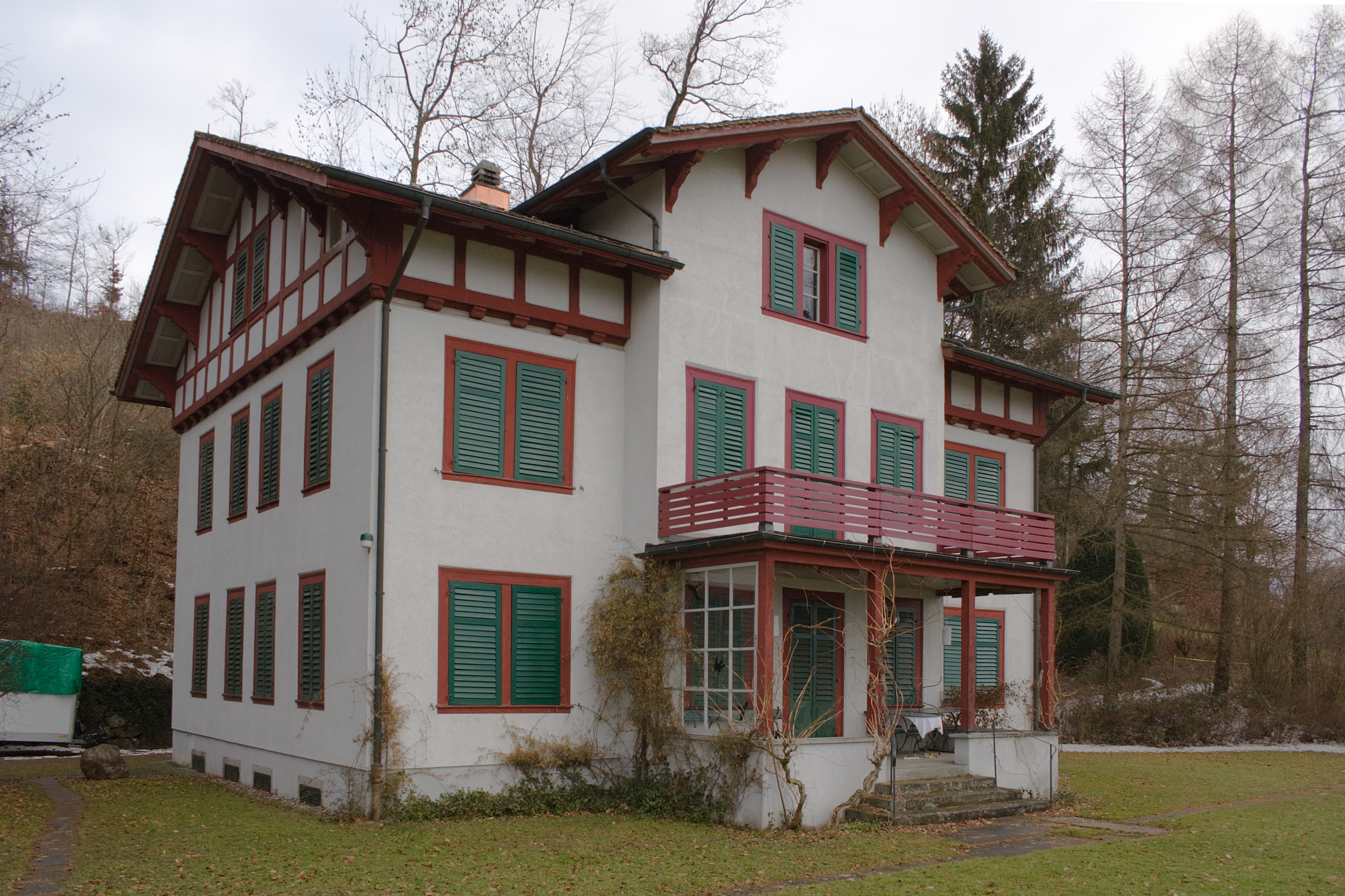 Landhaus des Kirchenhistorikers Arnold Nüscheler, Homberg 190 in Rifferswil, SchweizErbaut durch Ferdinand Stadler